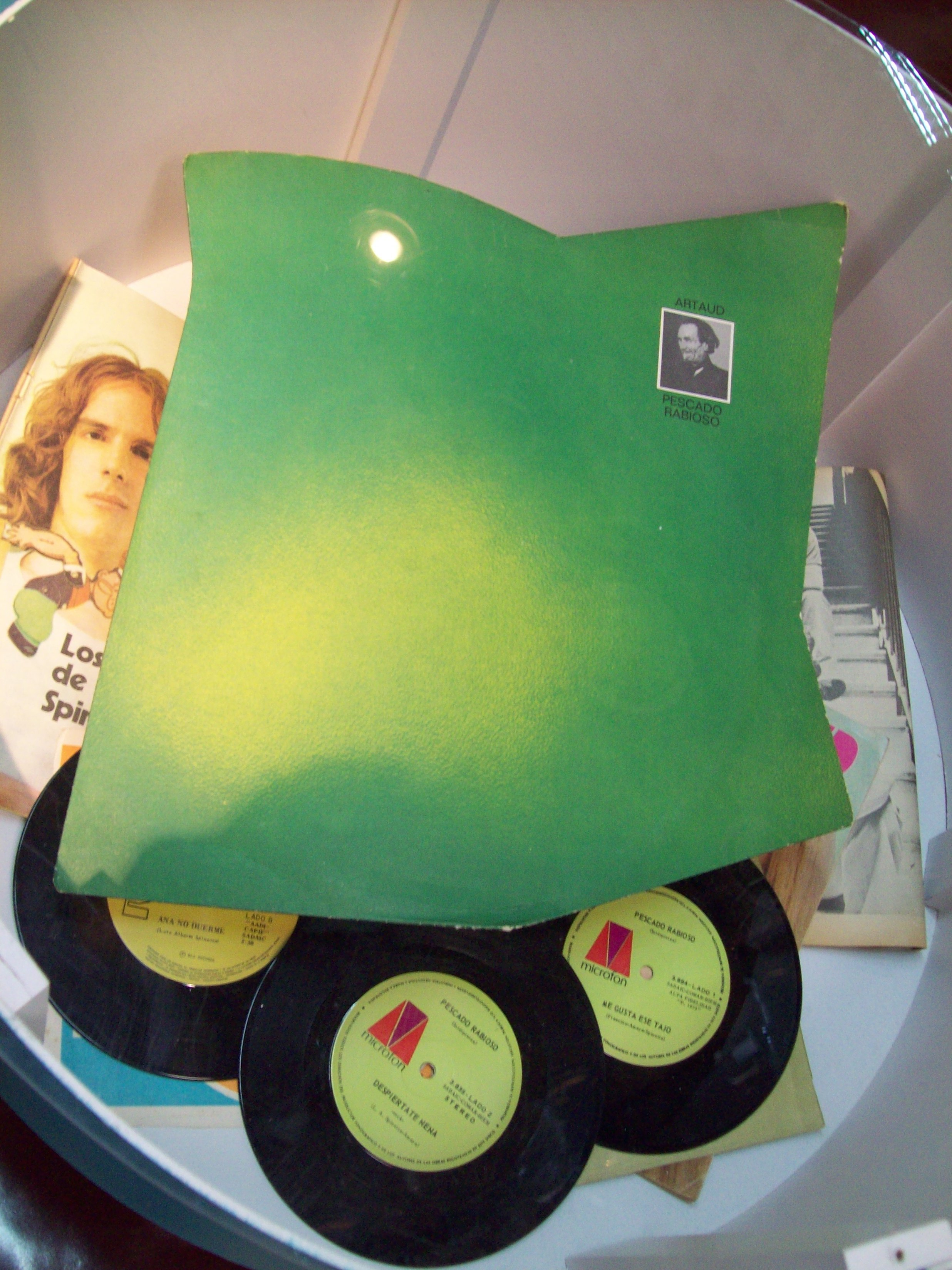 Sencillos y el álbum Artaud de Pescado Rabioso/Spinetta, en la muestra de la Biblioteca Nacional Pidamos peras a Jorge Álvarez.